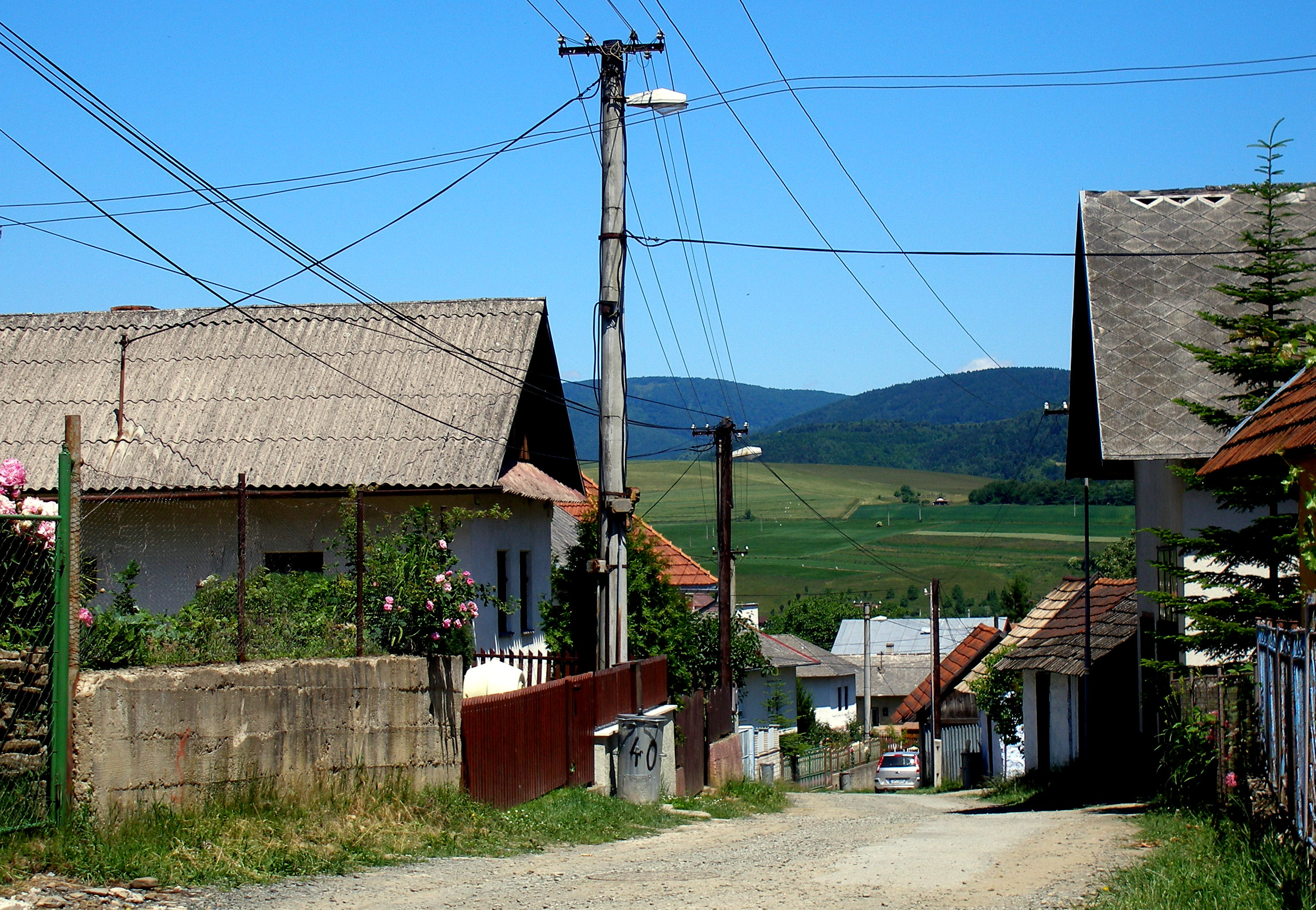 Obec Jakubova Voľa okres Sabinov